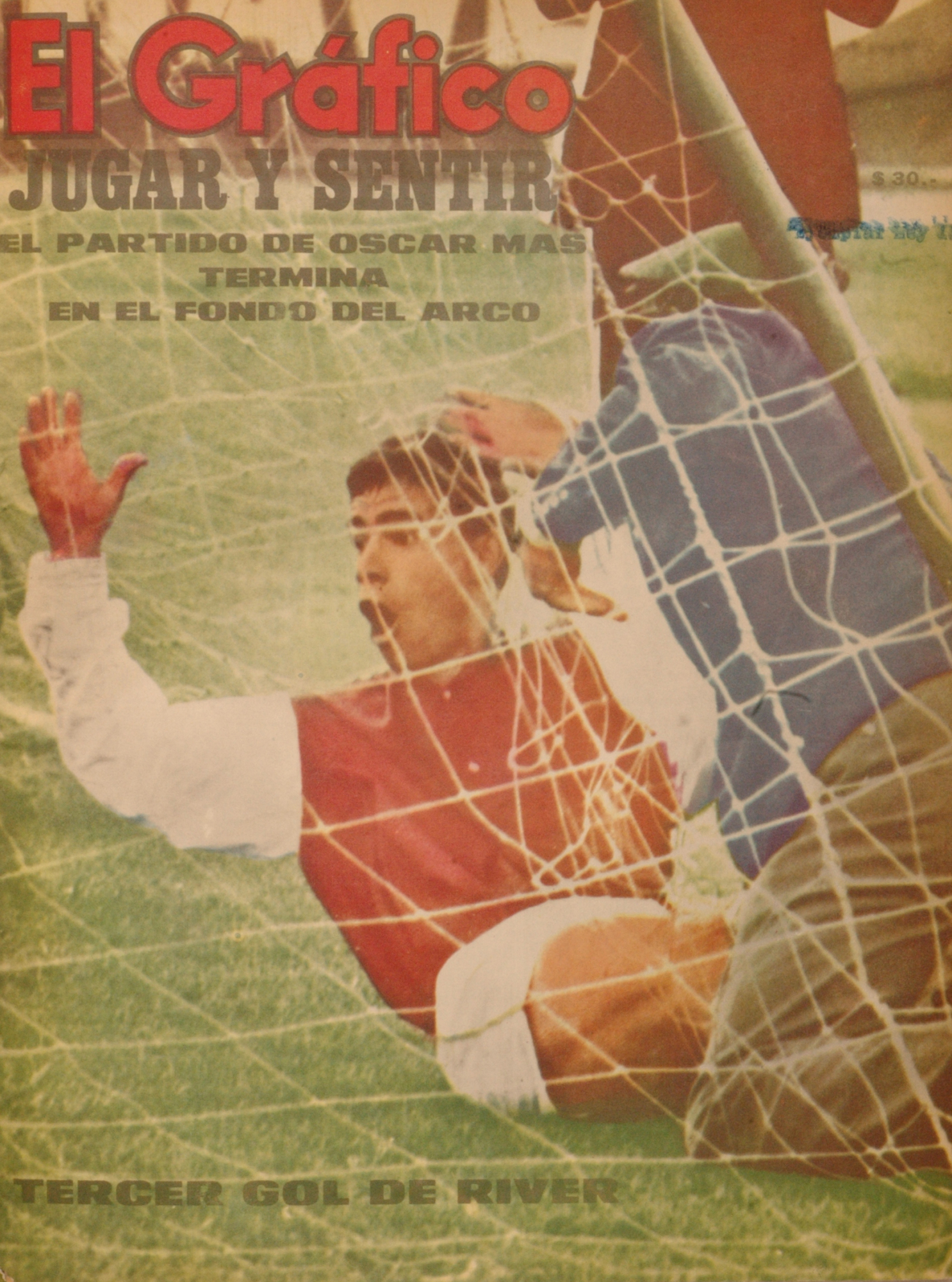 El Grafico del 12 de Octubre de 1965. Edicion 2401